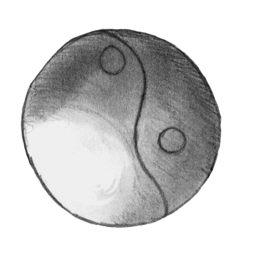 balle utilisée pour jouer au quidditch